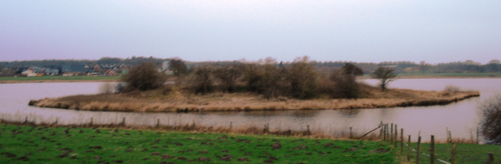 Die Insel im Ruppersdorfer See mit den Burgresten; Naturschutzgebiet „Ruppersdorfer See“ (NSG 180) in Ratekau